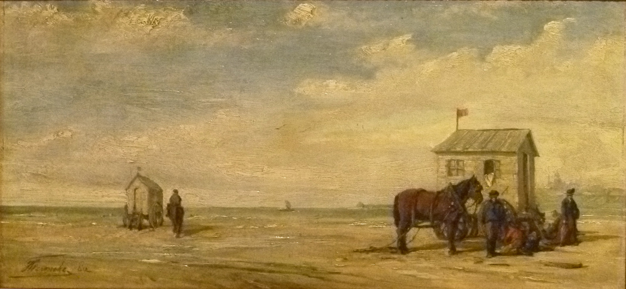 "Badkar op het strand van Oostende" (1880); olieverf op paneel door de Belgische kunstsschilder Henri Permeke (1849-1912); collectie Stad Oostende in MuZee